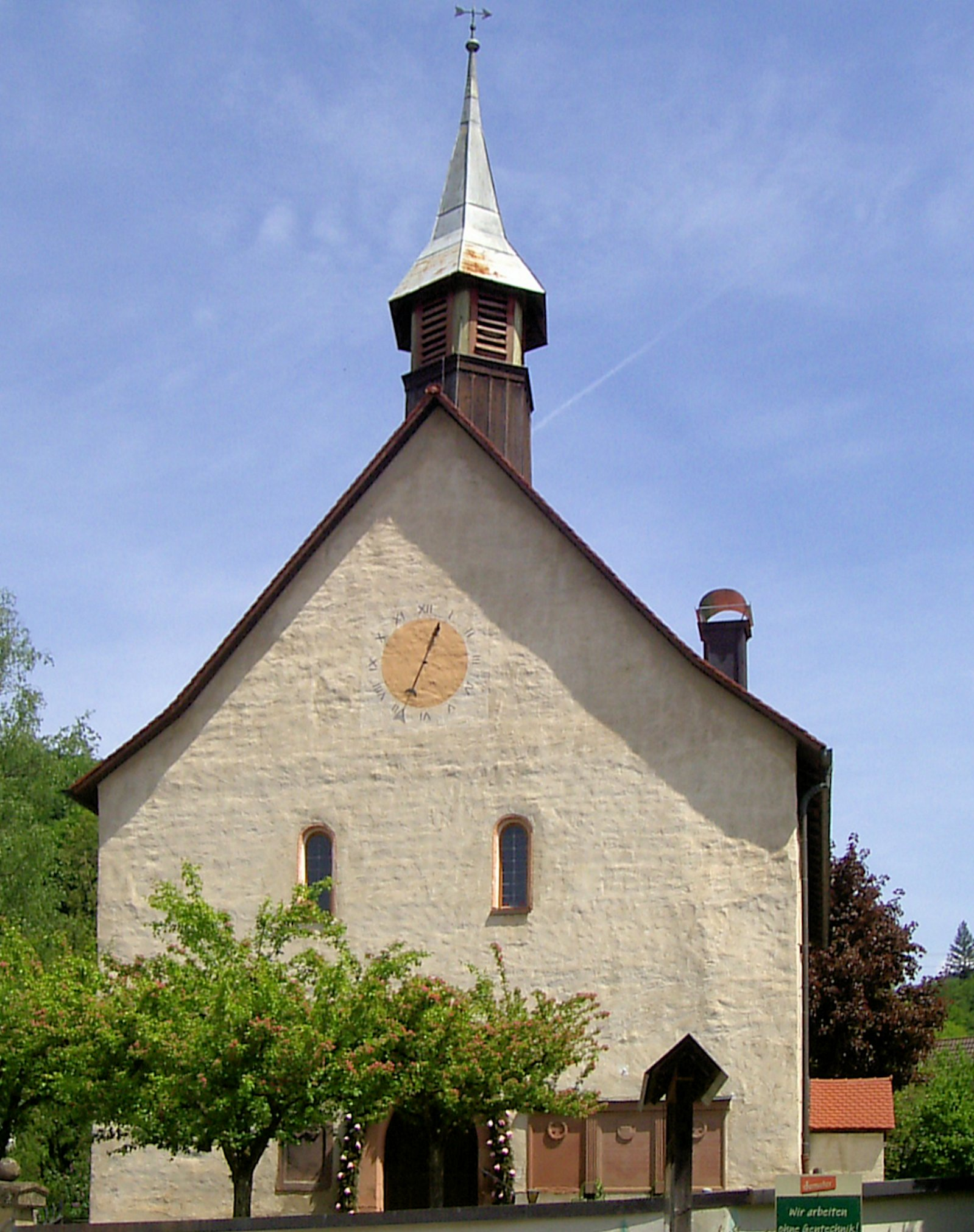 Klosterkirche in Sitzenkirch, Schwarzwald, Deutschland